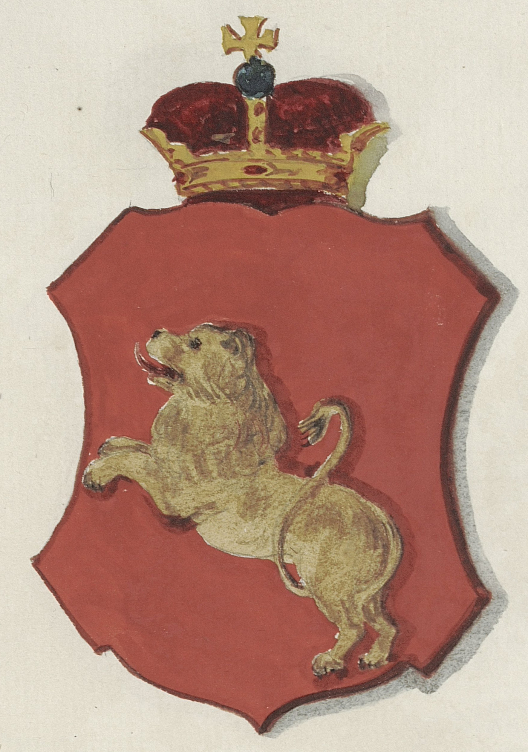 Беларуская (тарашкевіца): Герб князёў Жыжэмскіх (Žyžemski)